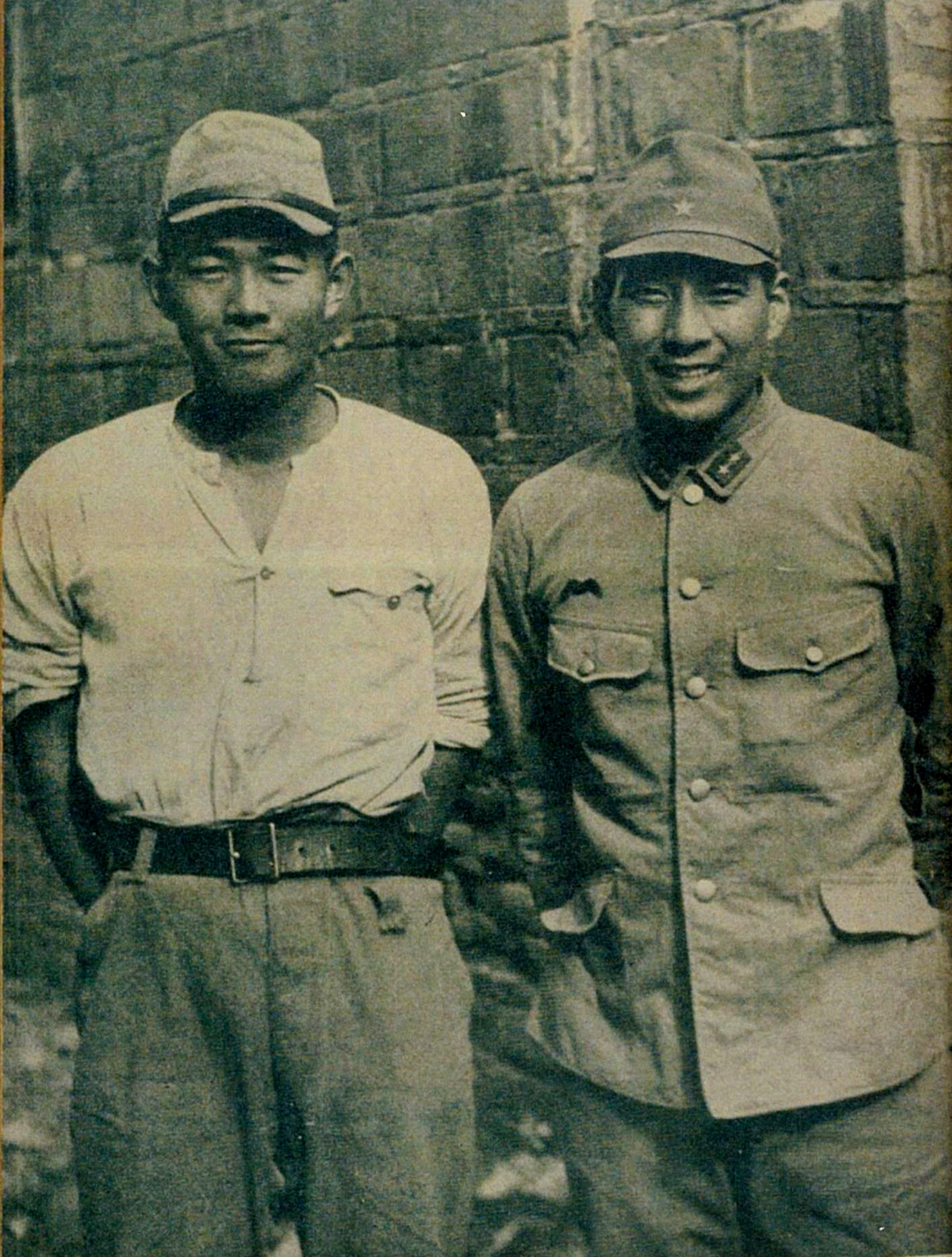 戦地で出会った沢村栄治（左、巨人軍）と小川年安（右、タイガース）